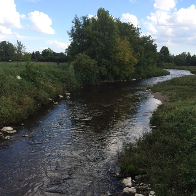 Il fiume Olona a valle del castello di Legnano